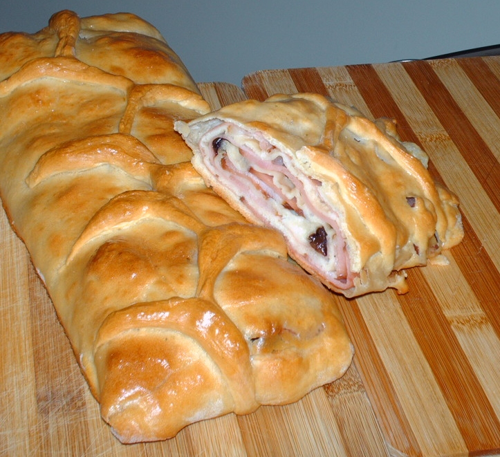 Es un pan típico de Venezuela, que forma parte de la gastronomía navideña del país.